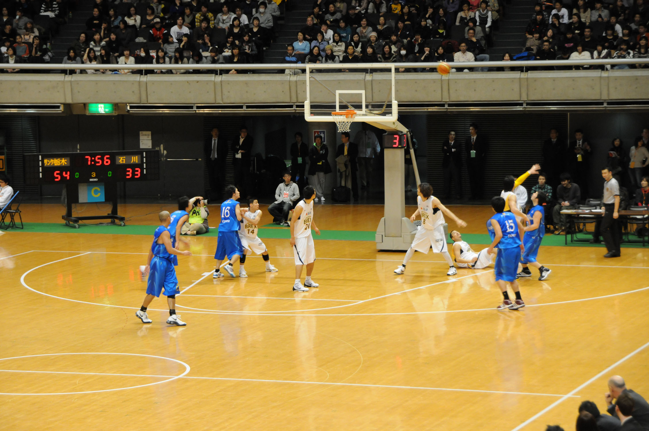 2010年全日本総合バスケットボール選手権大会3回戦、リンク栃木ブレックス対石川ブルースパークス。東京体育館で。